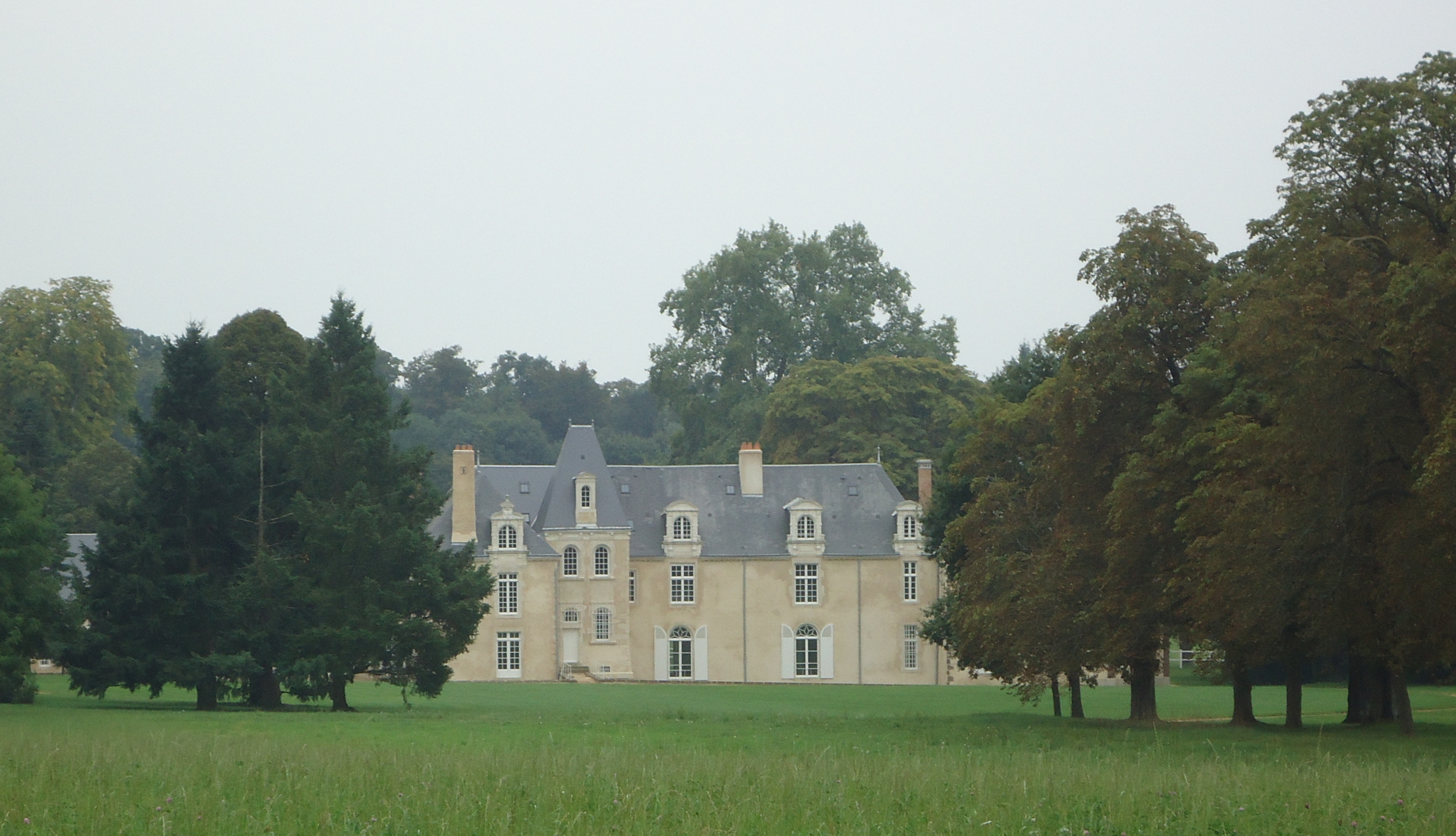 Château de Maquillé - Souligné-Flacé - Sarthe (72)